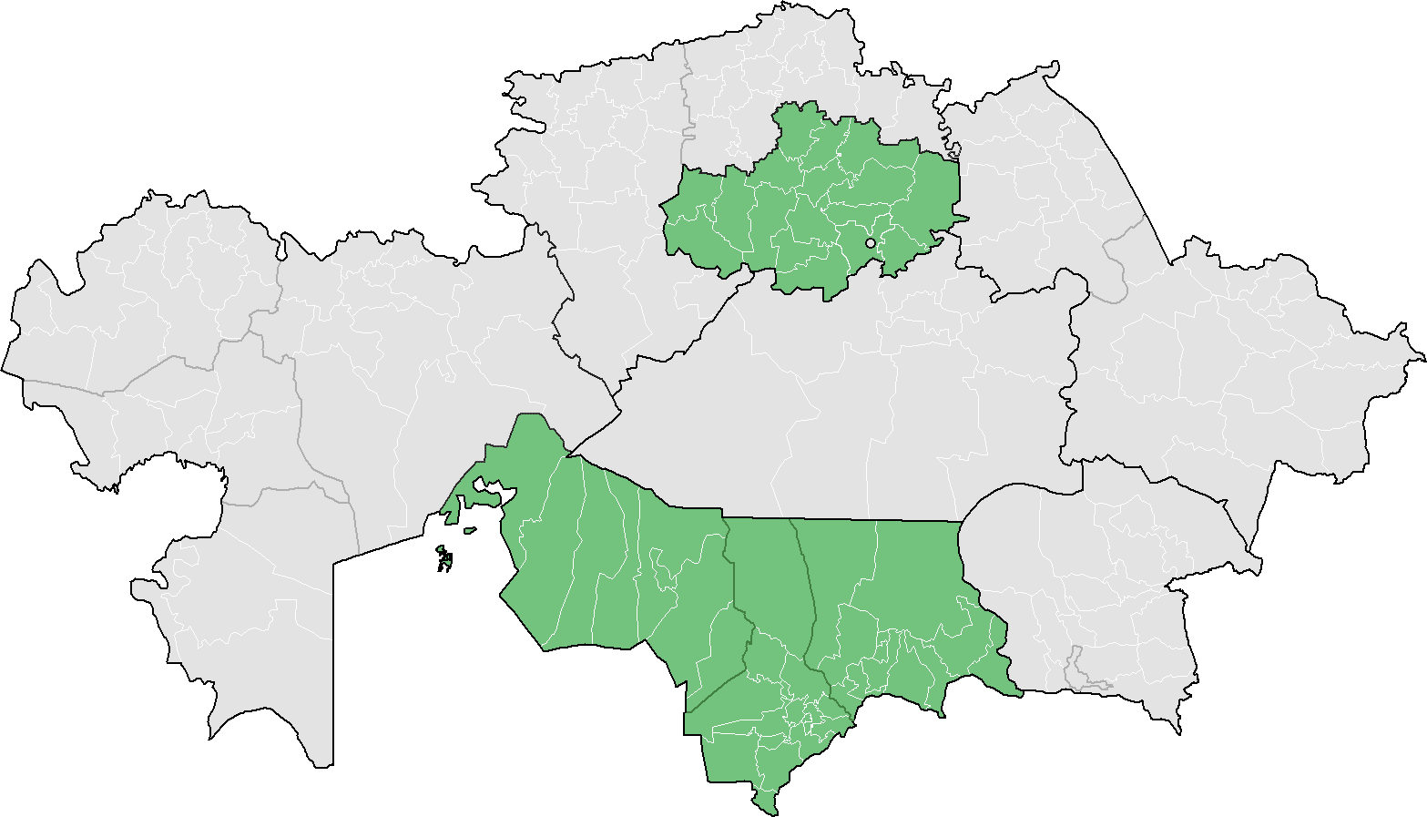 Чимкентская и Акмолинская епархия